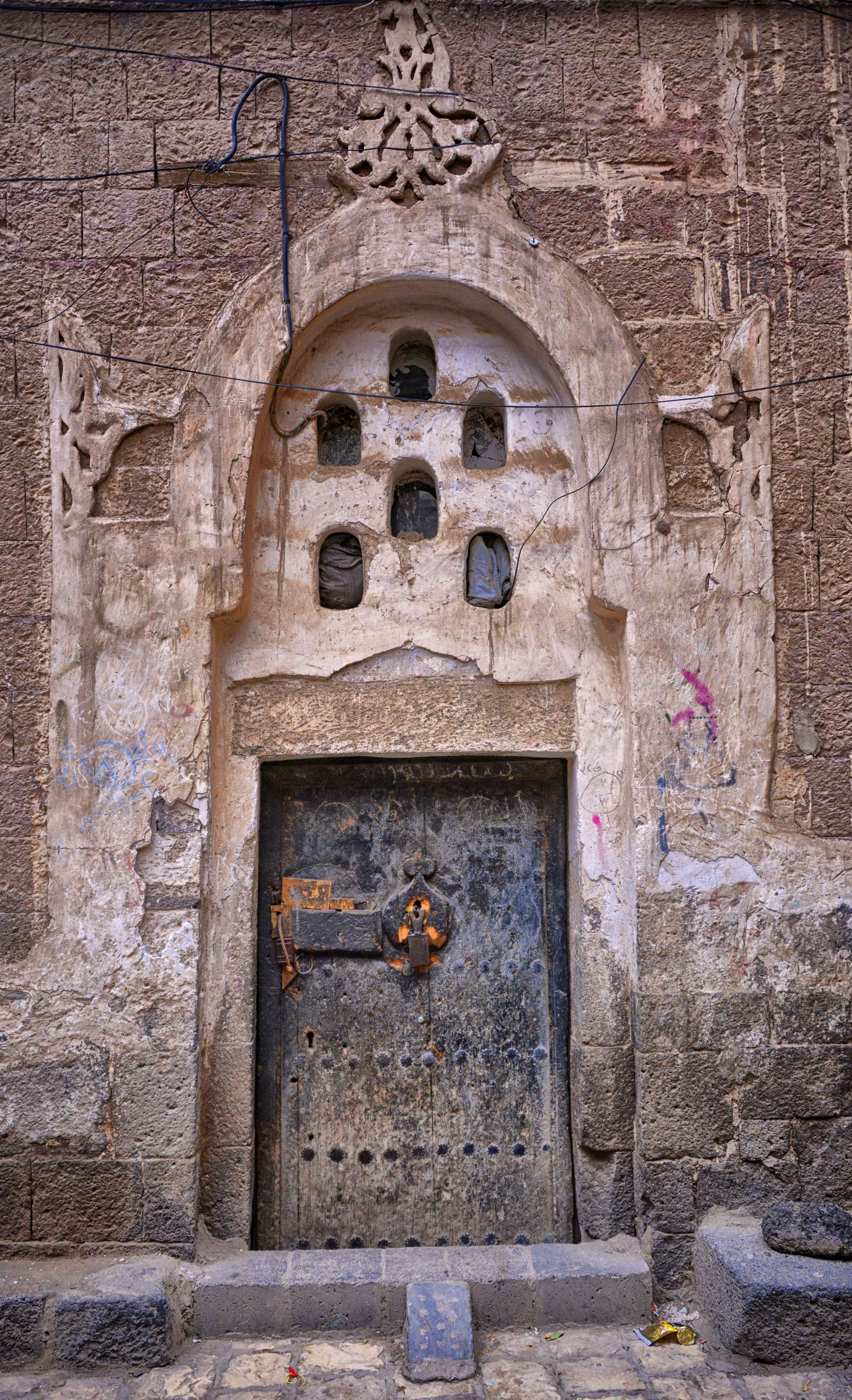 Yemen